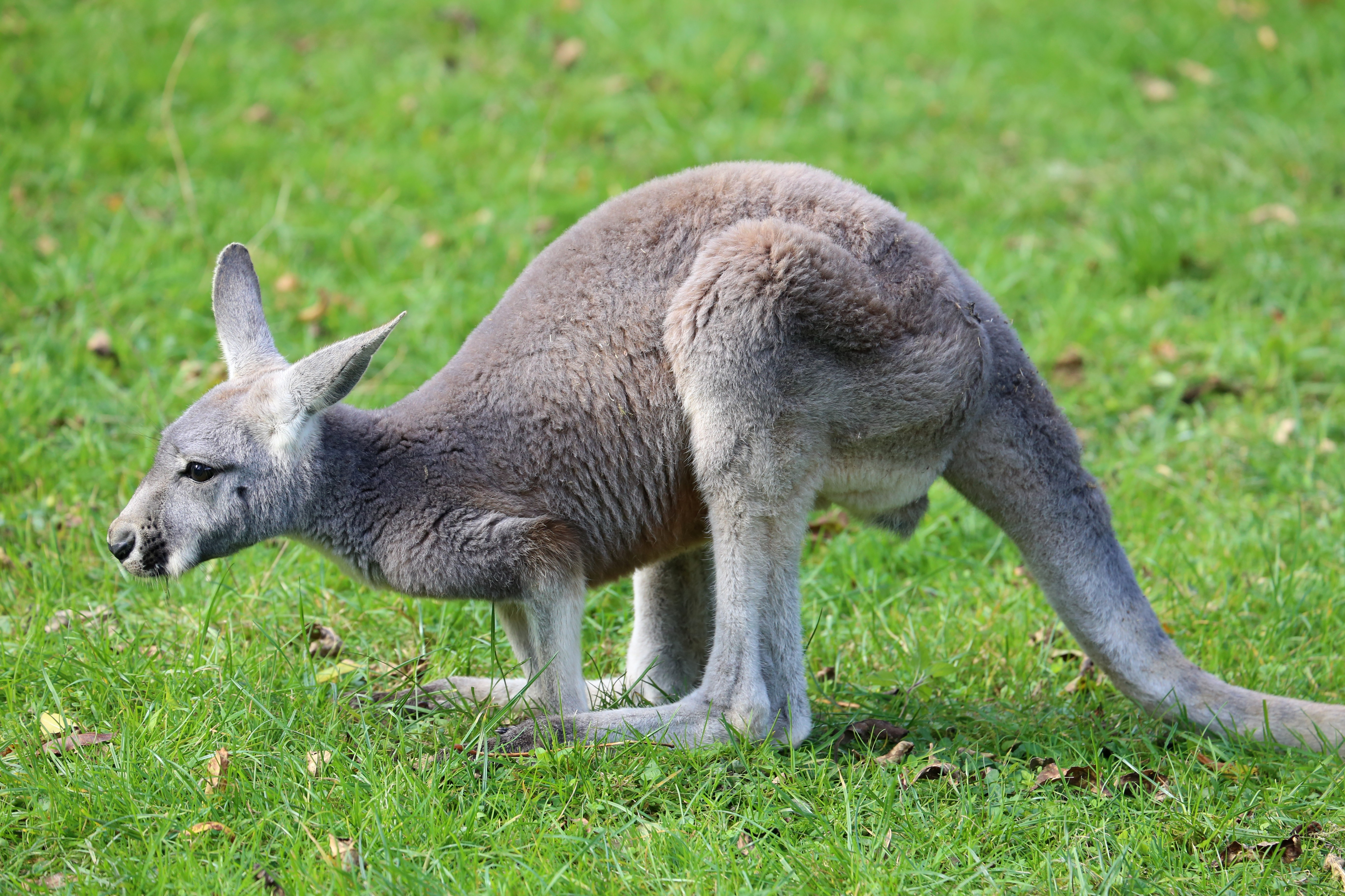 Rotes Riesenkänguru (Macropus rufus), Tierpark Hellabrunn, München